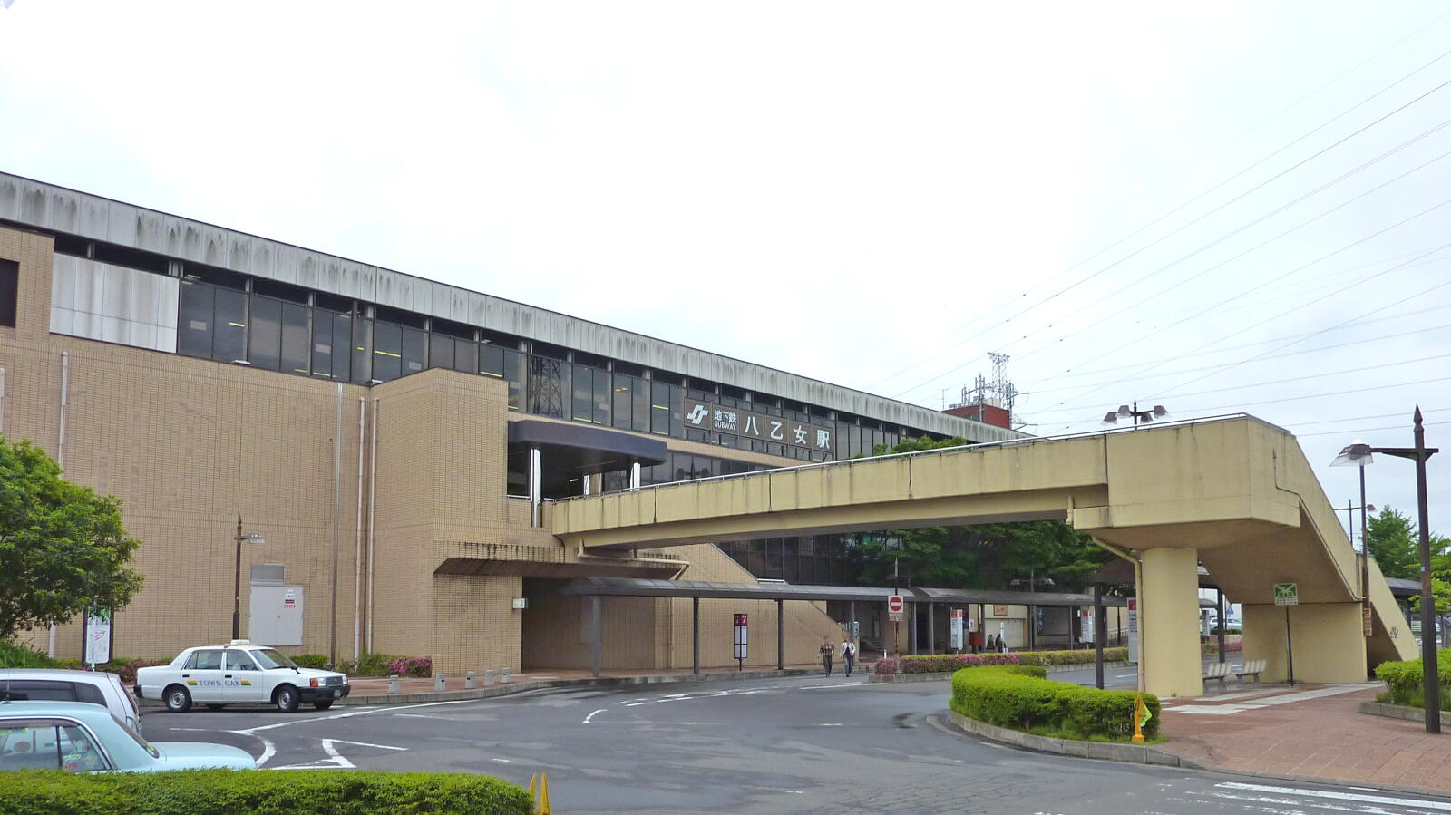 八乙女駅